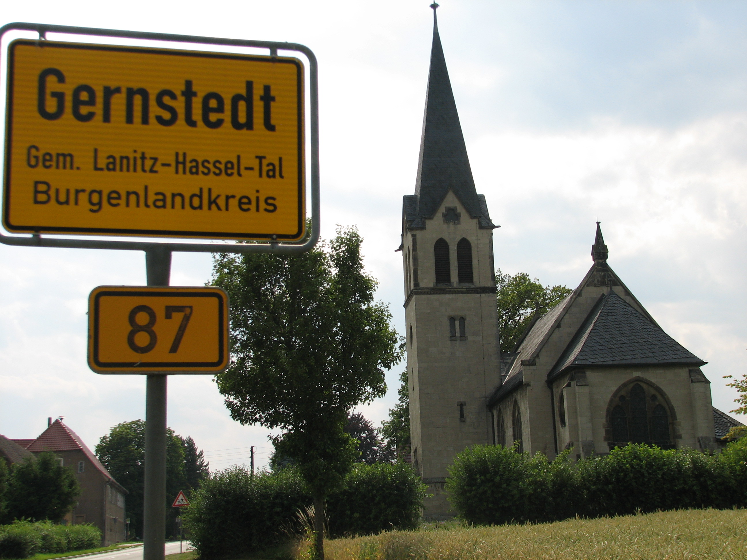 Die Kirche von Gernstedt, eingeweiht 1896, liegt direkt am Ortseingang an der Bundesstraße B 87